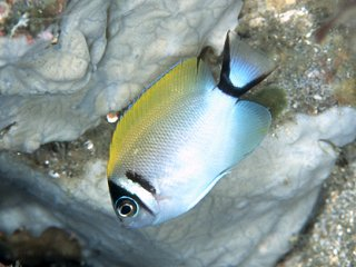 Genicanthus semifasciatus en Izu, Japón